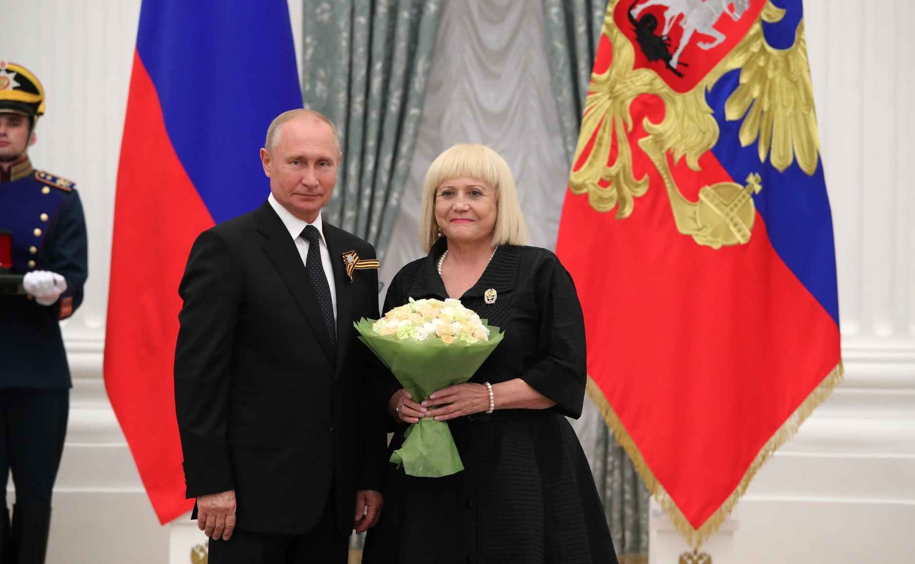 Вручение Государственных премий Российской Федерации. С председателем совета Общероссийской общественной благотворительной организации «Союз семей военнослужащих России» Марией Большаковой.